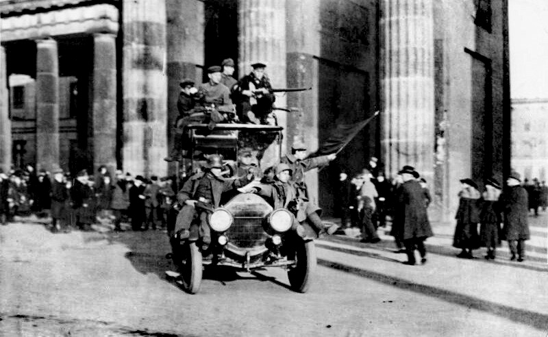 Novemberrevolution 1918 in Berlin Ein Lastauto, mit revolutionären Matrosen und Soldaten besetzt, fährt durch das Brandenburger Tor. 9.11.1918